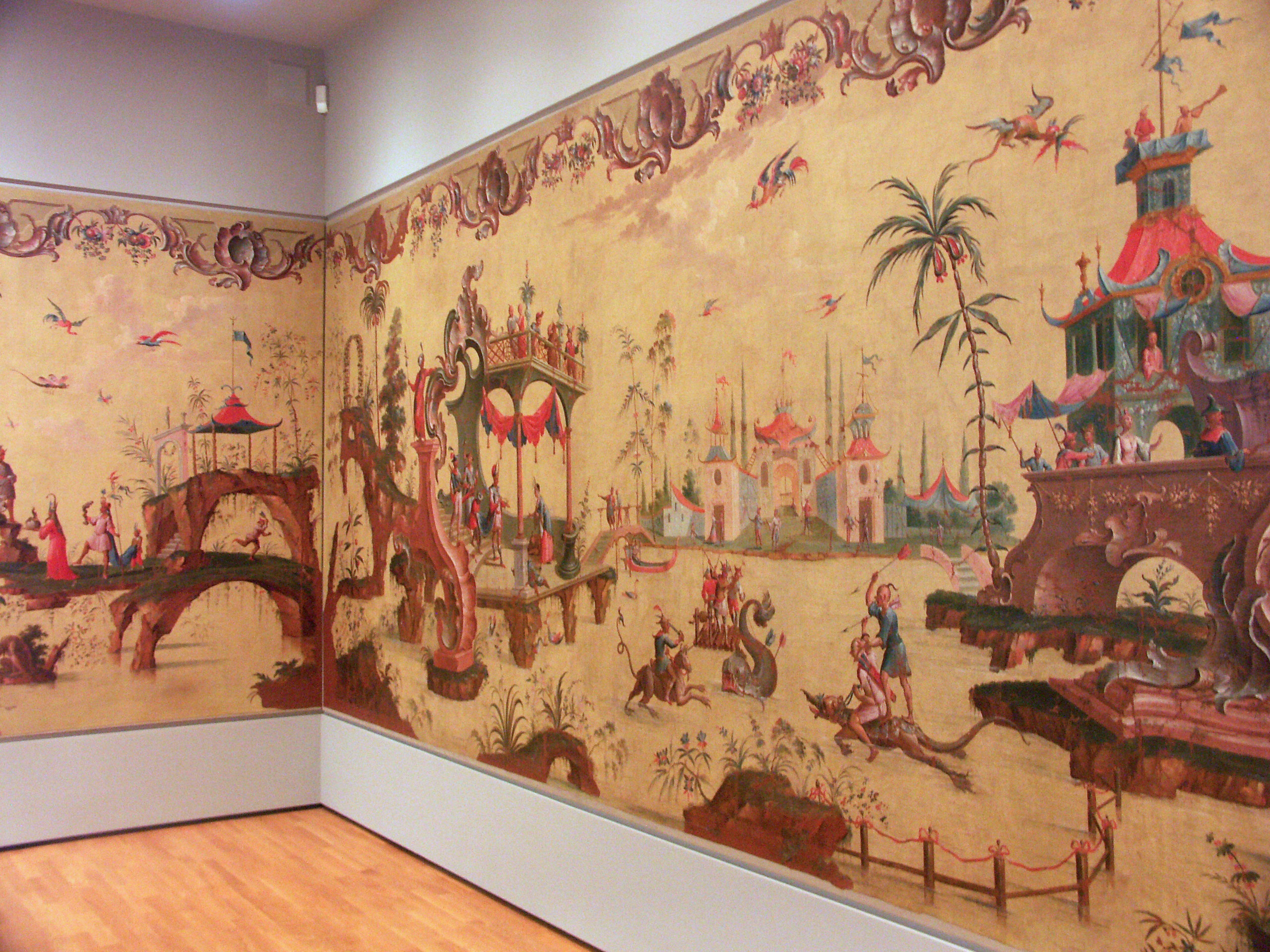 Teil der Tapete aus dem Rittergut Zehmen bei Leipzig im Museum für angewandte Kunst in Leipzig